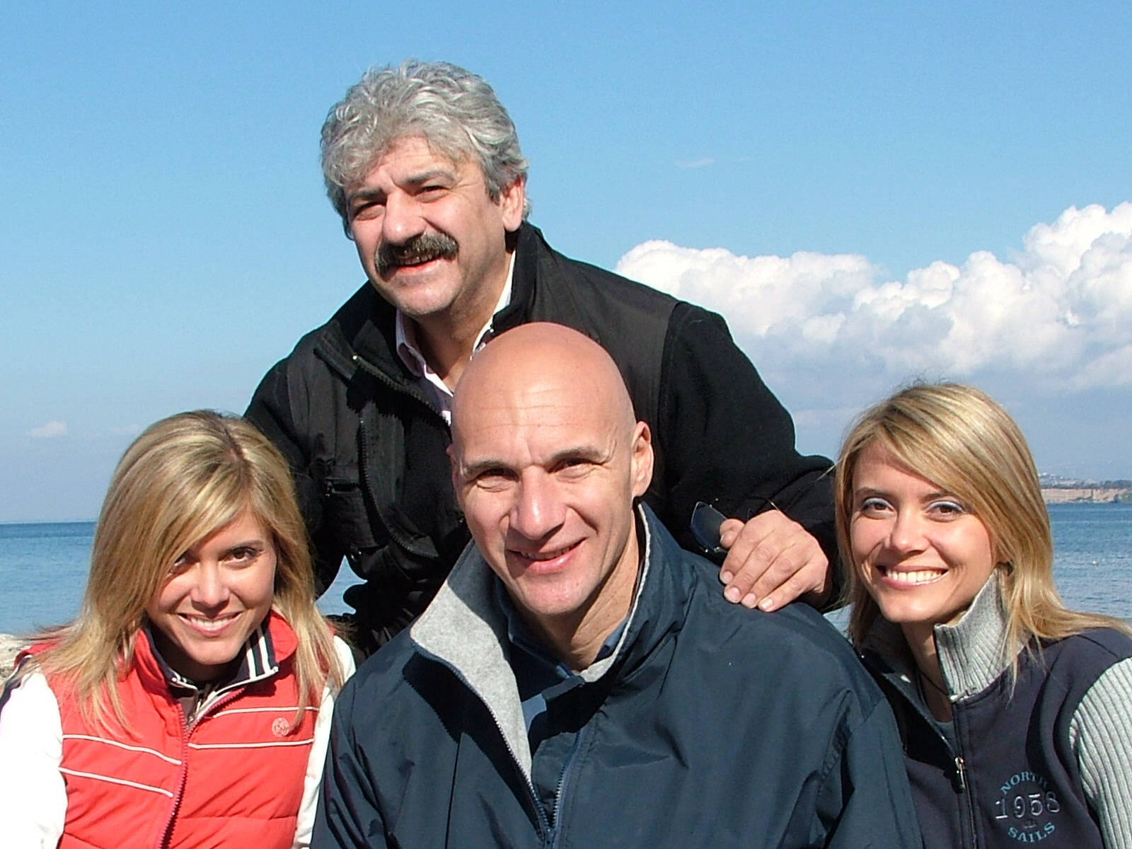 Oliviero sorbini con i conduttori Gianluca Genoni, Silvia Squizzato e Laua Squizzato